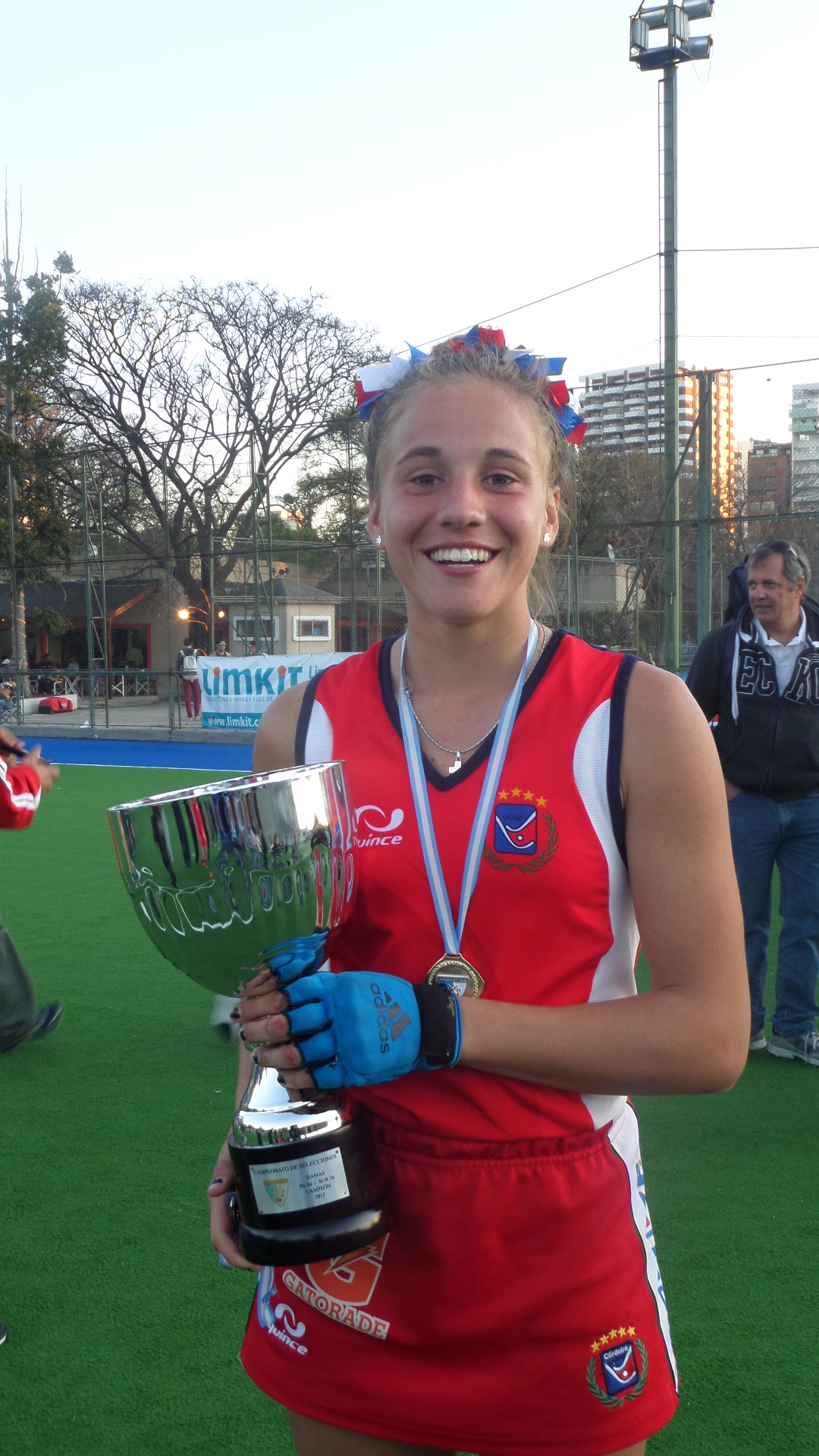 JUNKANAS JULIETA